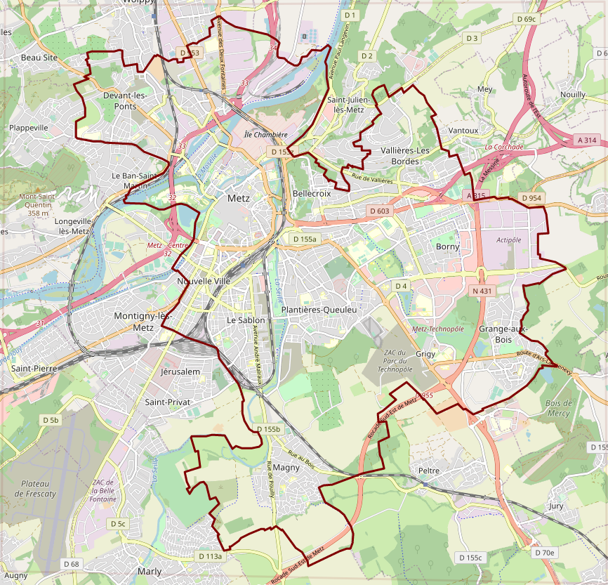 carte réalisée sur umap This map may be incomplete, and may contain errors. Don't rely solely on it for navigation.